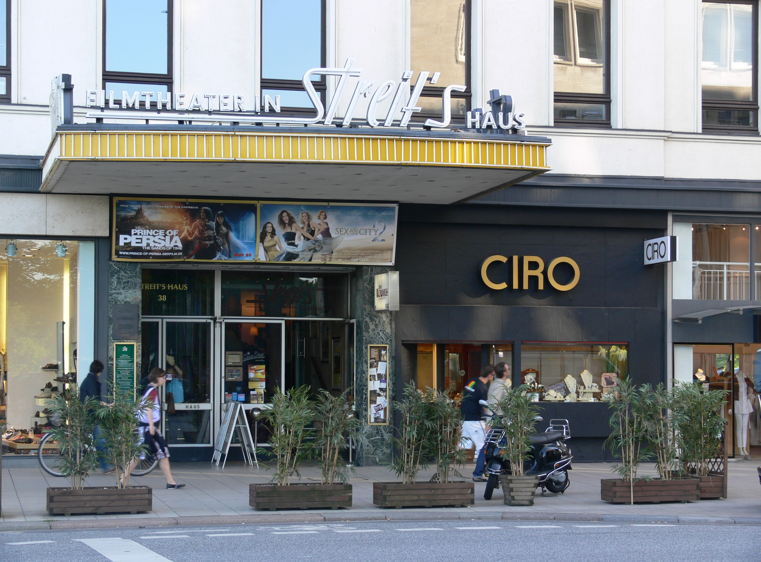 Hamburg, Filmtheater in Streit's Haus (Jungfernstieg)